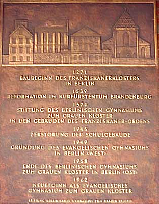 Gedenktafel zu Ehren des Berlinischen Gymnasiums zum Grauen Kloster